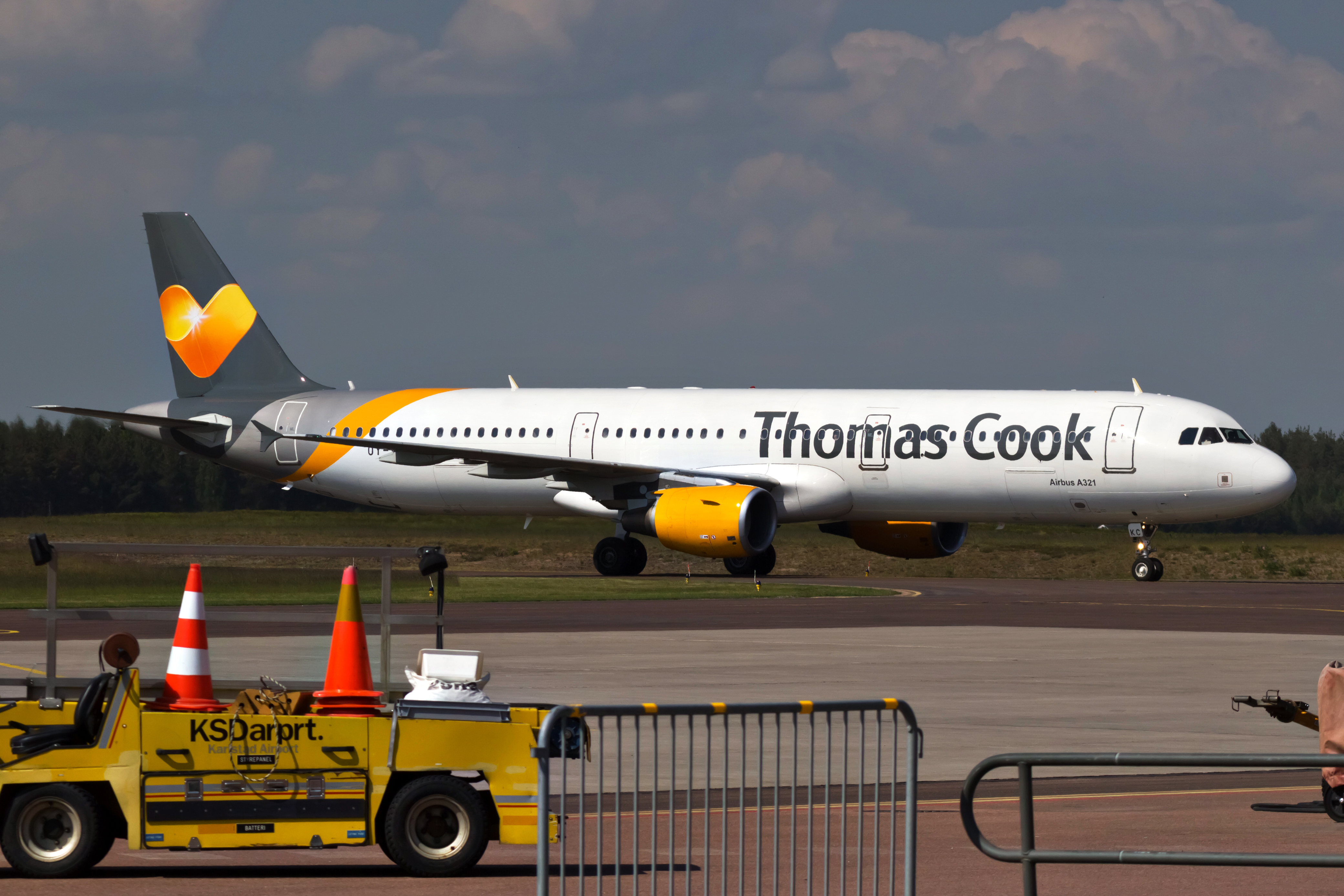 Airbus A321 de Thomas Cook chegando ao aeroporto de Karlstad.